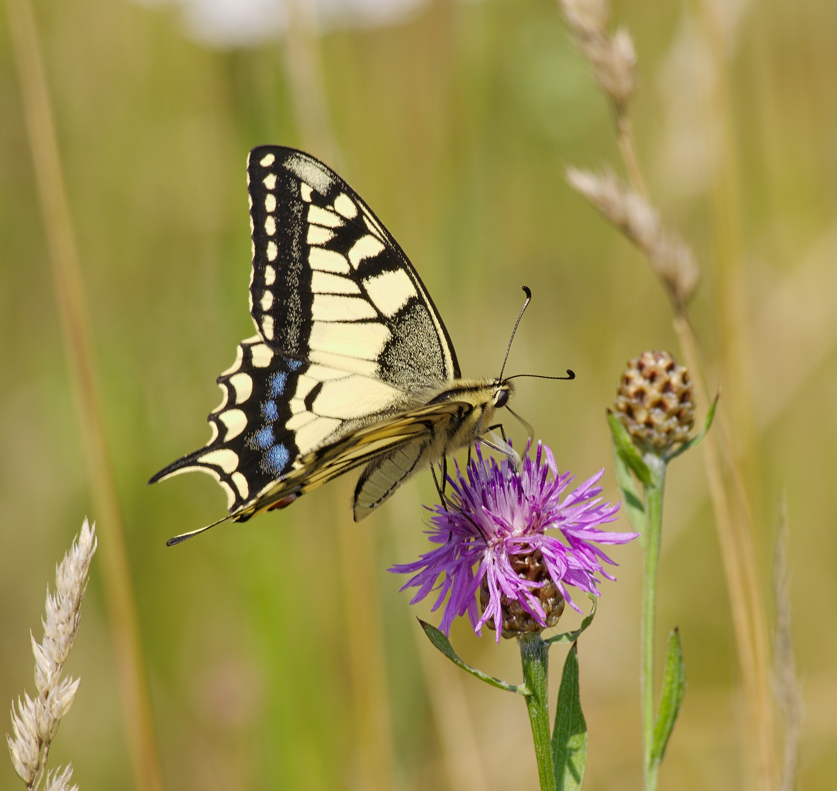 Schwalbenschwanz - Papilio machaon. Aufgenommen am Schwarzbach in Wöllnau, Doberschütz, Sachsen, Deutschland.